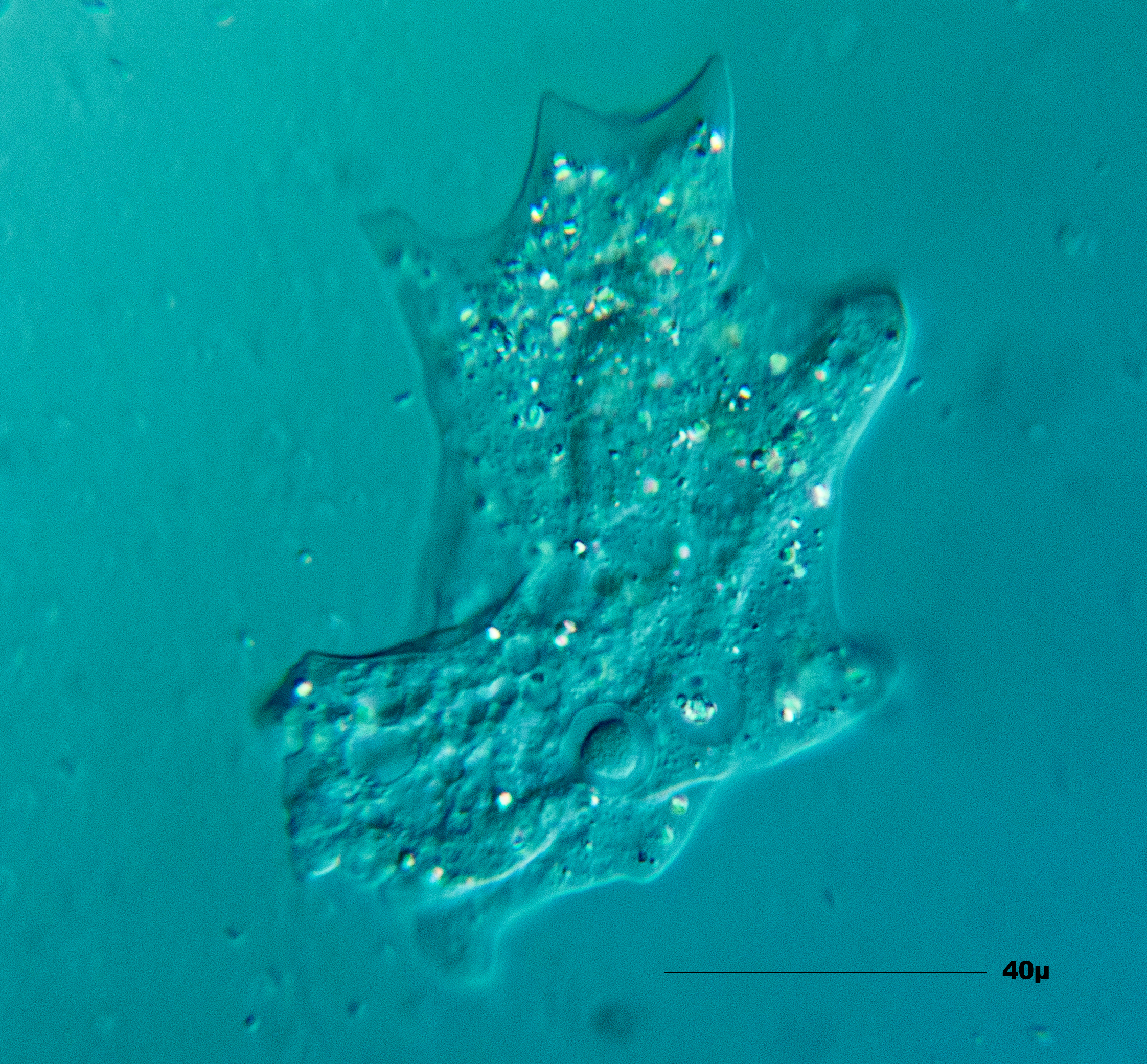 Zdjęcie ameby, widok spod mikroskopu English | Polski | +/−